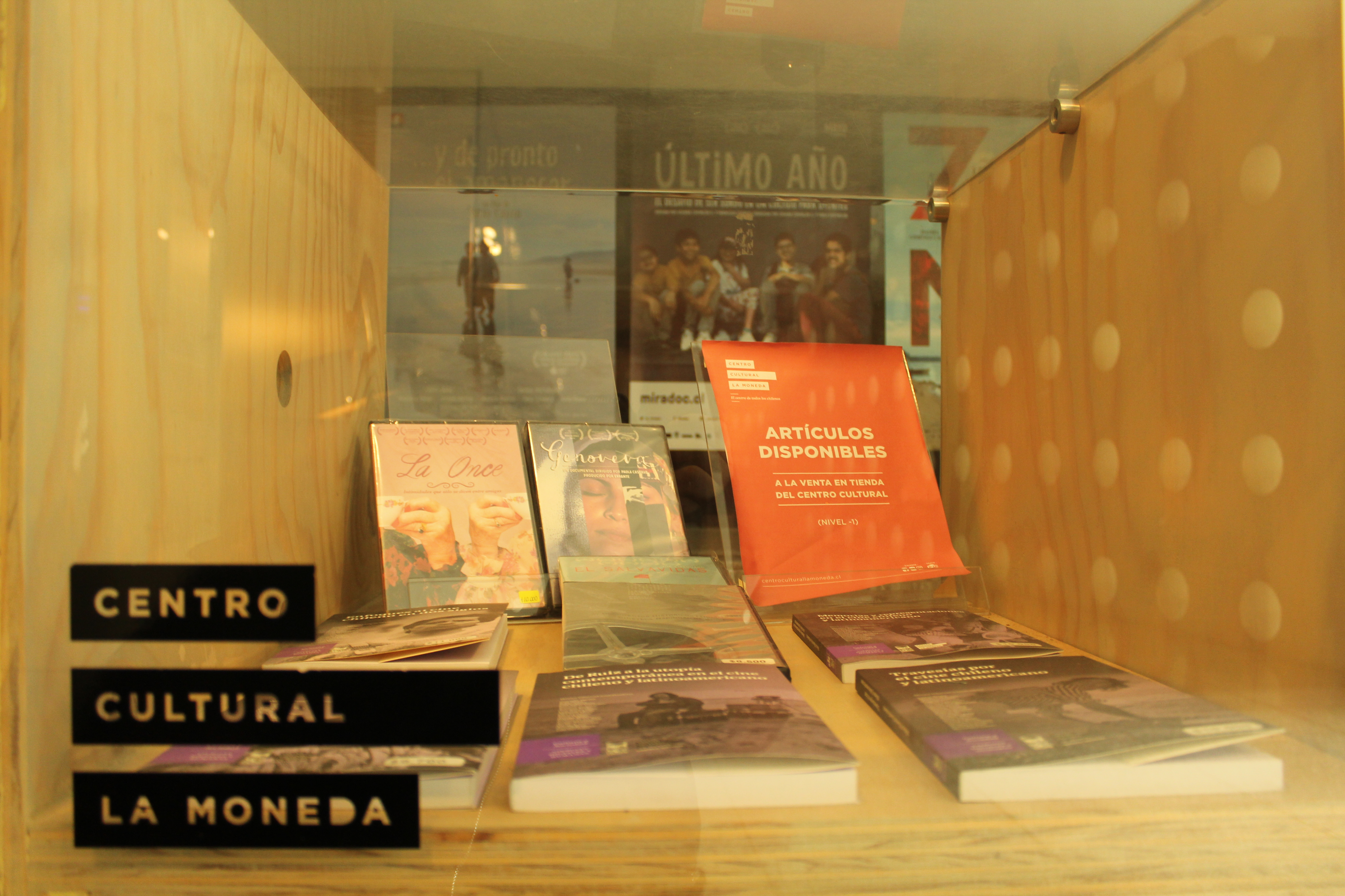 Algunas de las publicaciones de la Cineteca Nacional de Chile a la venta en la boletería del recinto